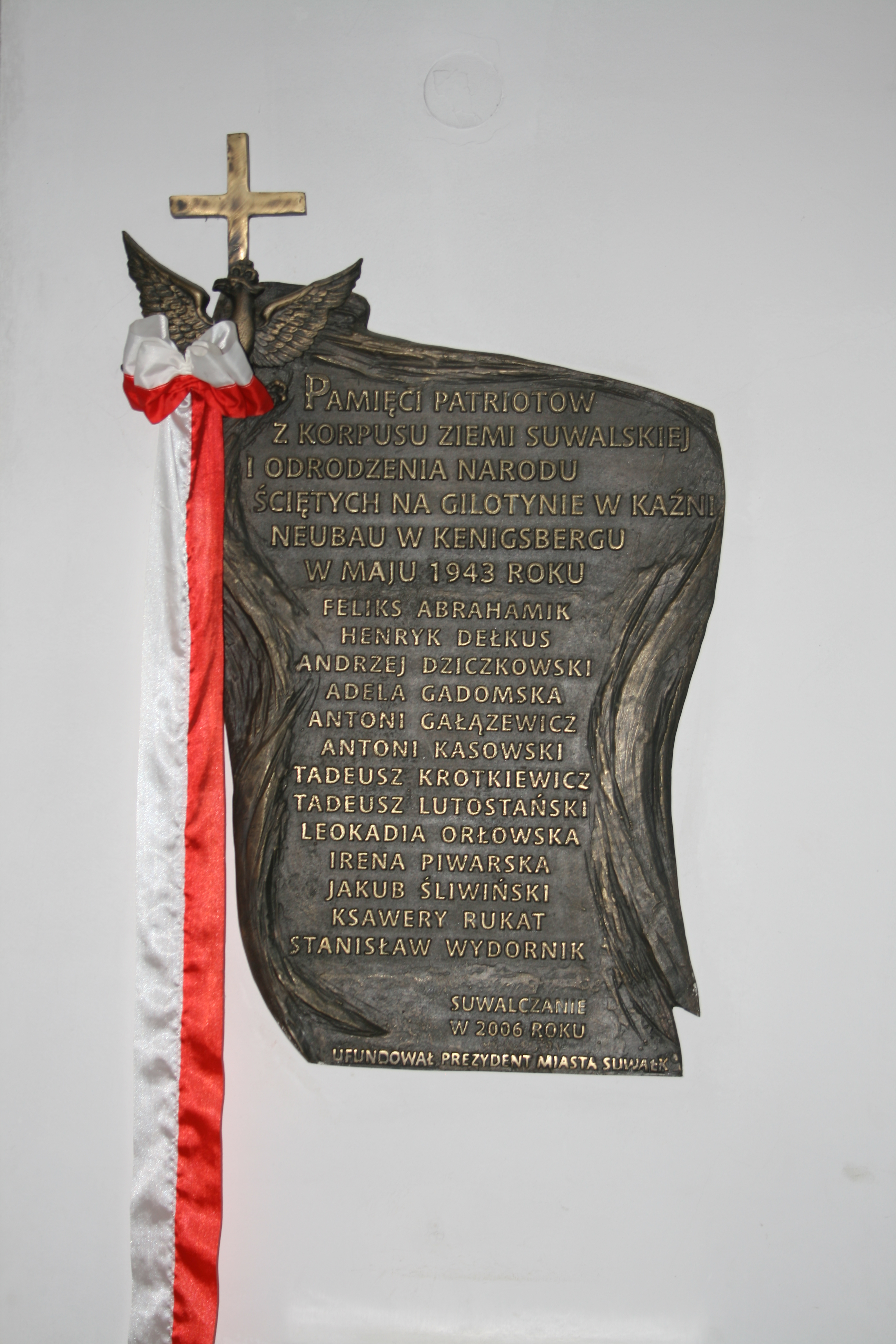 Suwałki. Tablica upamiętniająca członków Korpusu Ziemi Suwalskiej i Odrodzenia Narodu, organizacji konspiracyjnych działających w Suwałkach na początku II wojny światowej, znajdująca się w kościele pw. Najświętszego Serca Pana Jezusa.